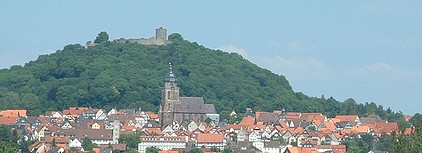 Blick auf Homberg (Efze)